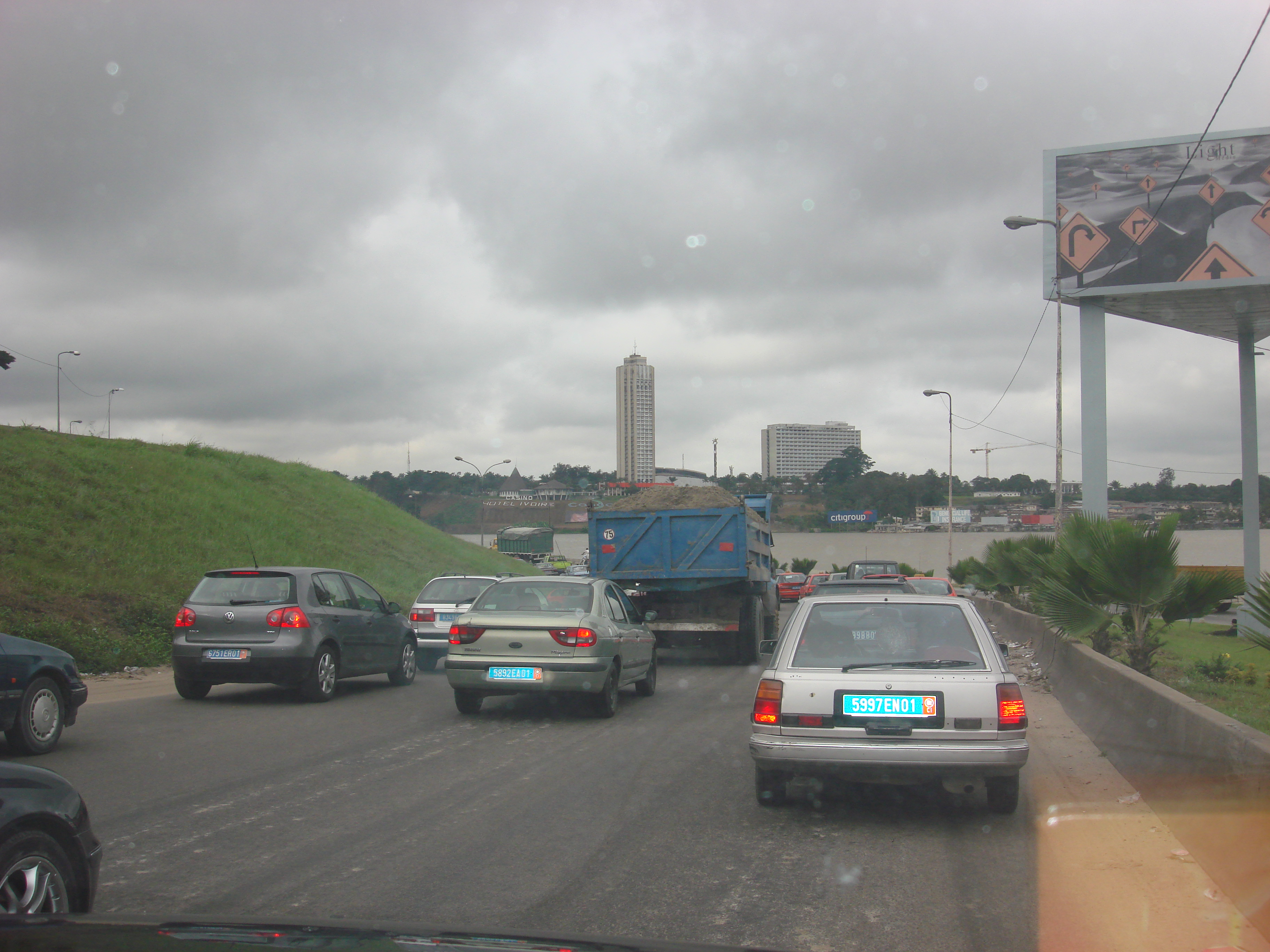 Hôtel Ivoire, Abidjan Cocody. Vue de la sortie du pont Général De Gaulle. Côte d'Ivoire.